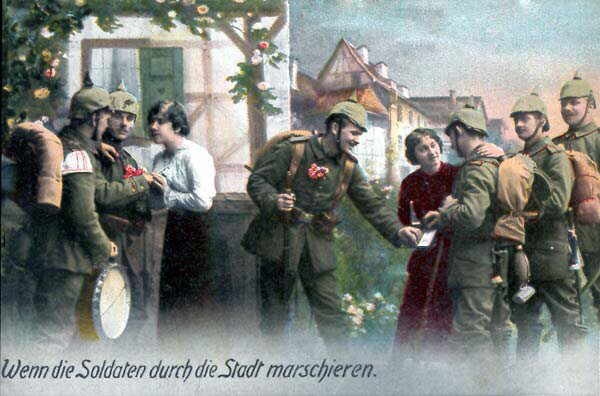 Открытка, отправленная с фронта солдатом в 1916 году